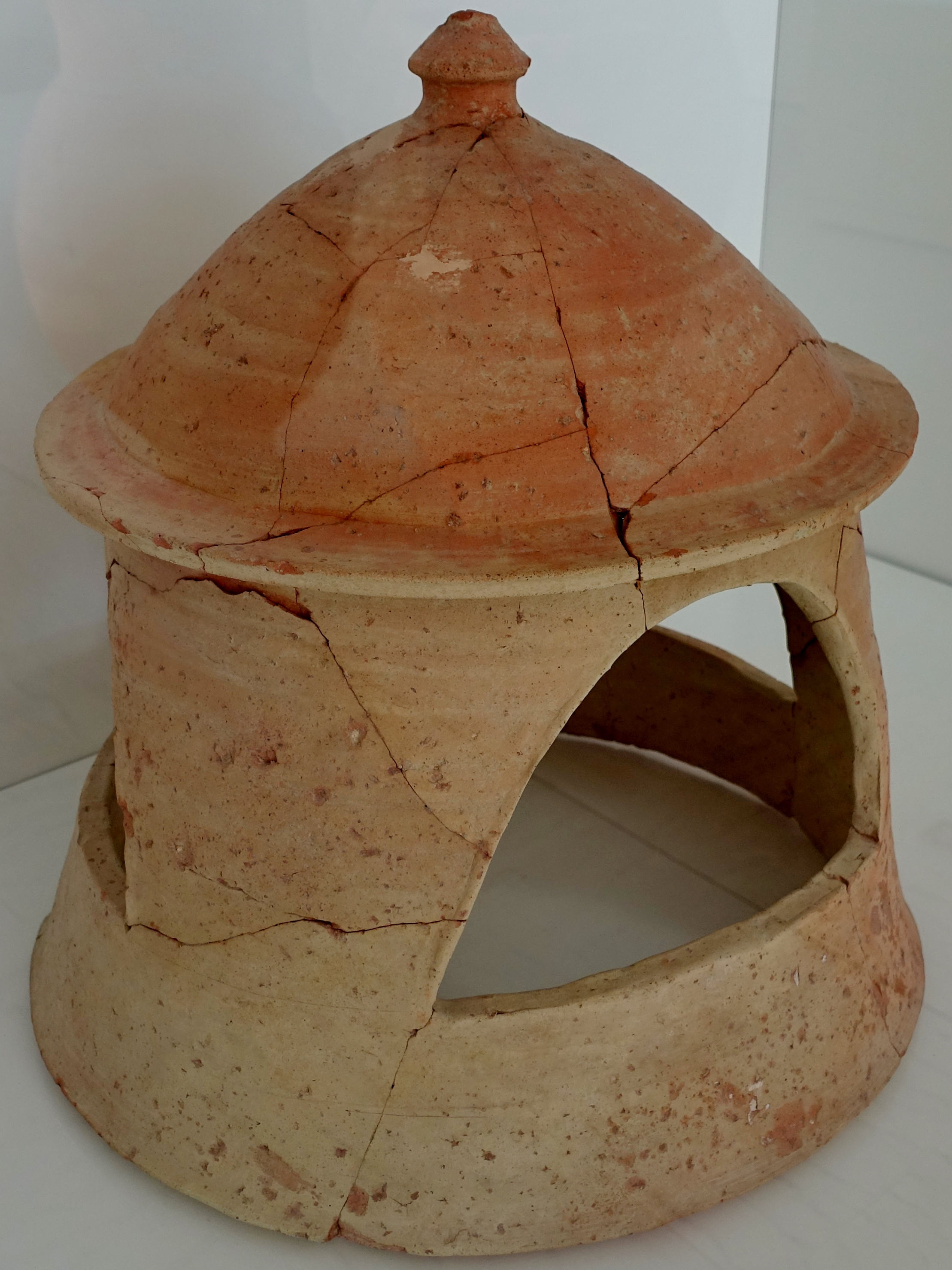 Ofen aus Trypitos, Archäologisches Museum von Sitia, Kreta, Griechenland